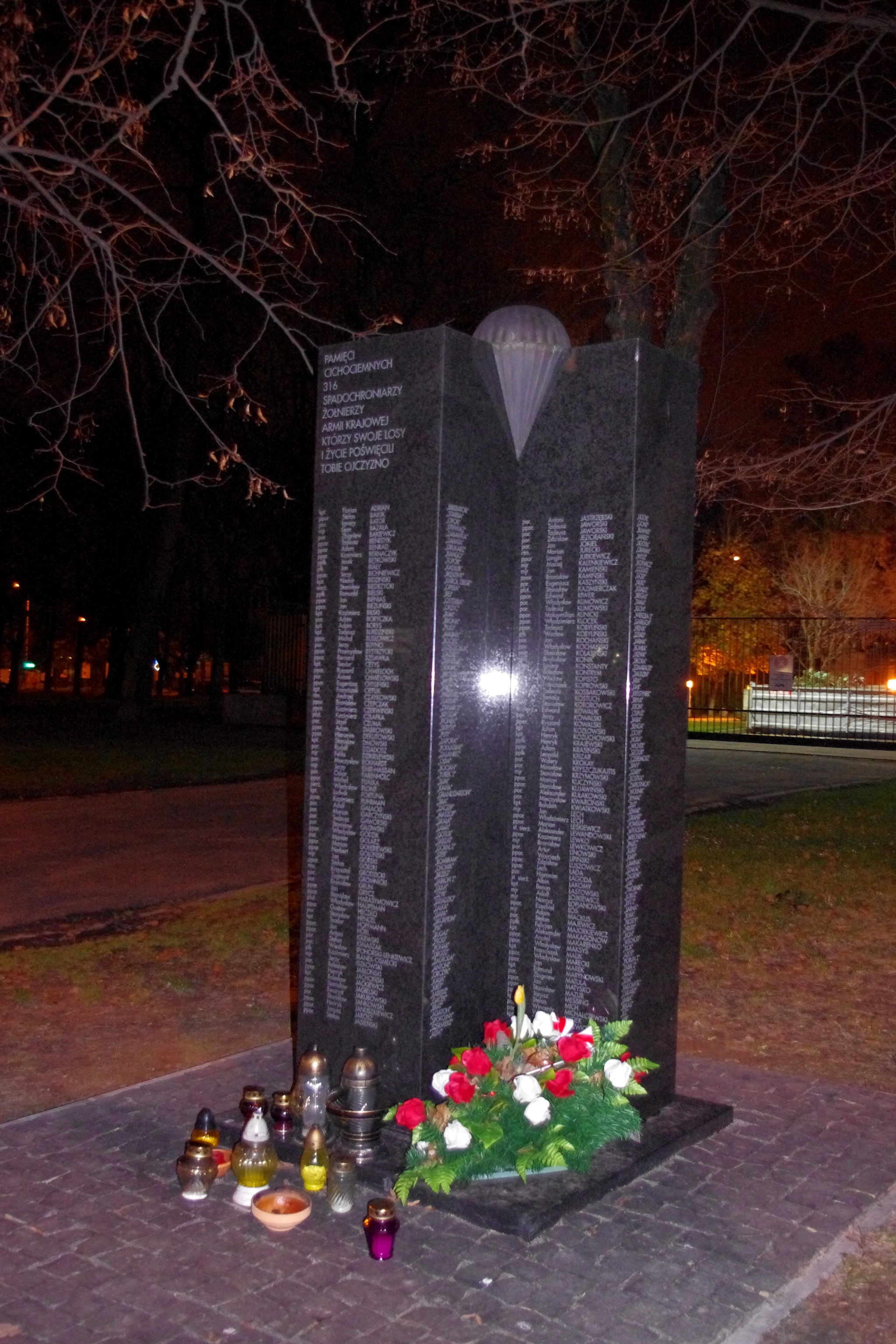 Pomnik Cichociemnych Spadochroniarzy AK w Warszawie, przy ul. Jana Matejki